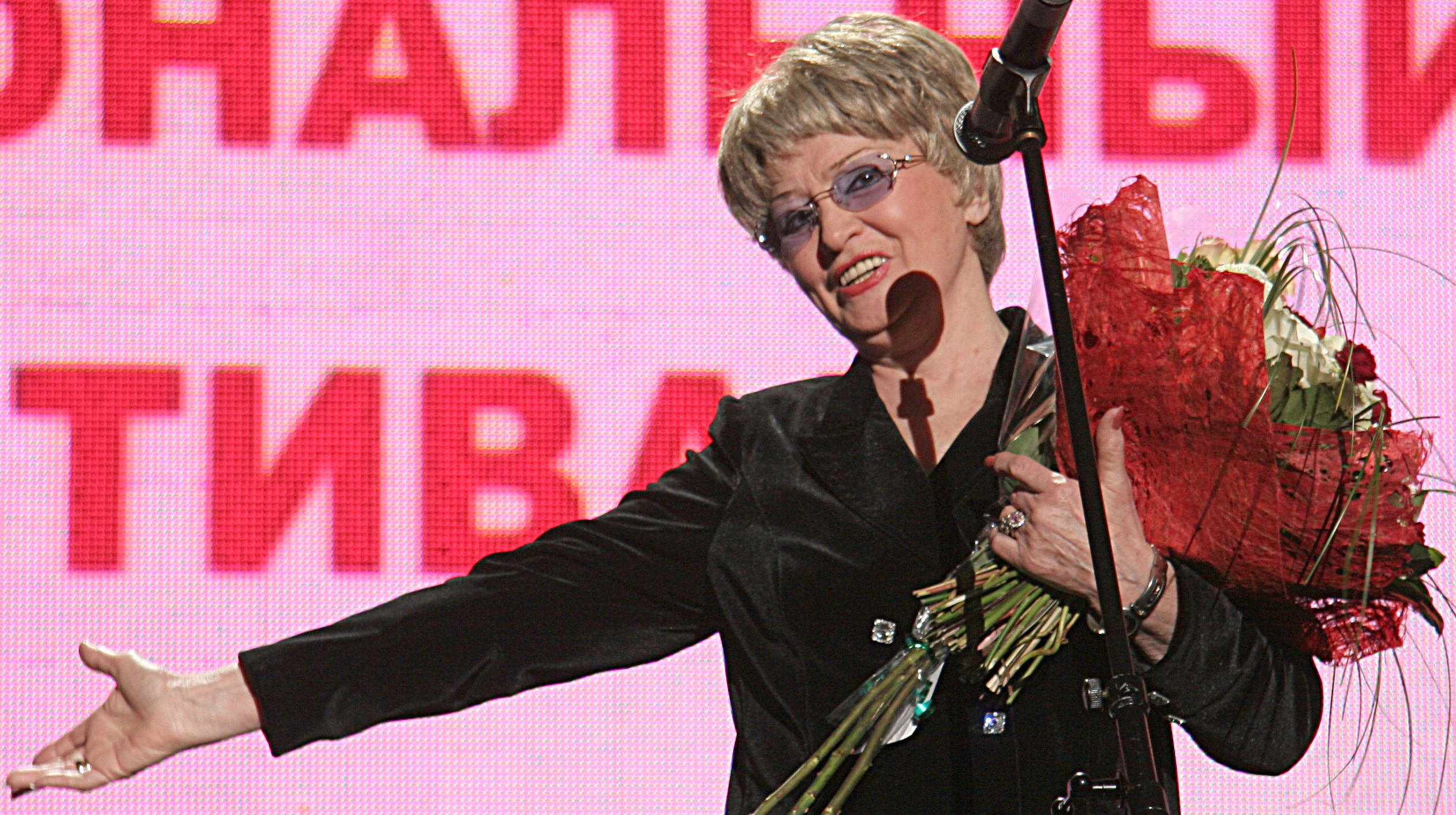 Татьяна Шмыга на открытии фестиваля "Музыкальное сердце театра", 2006